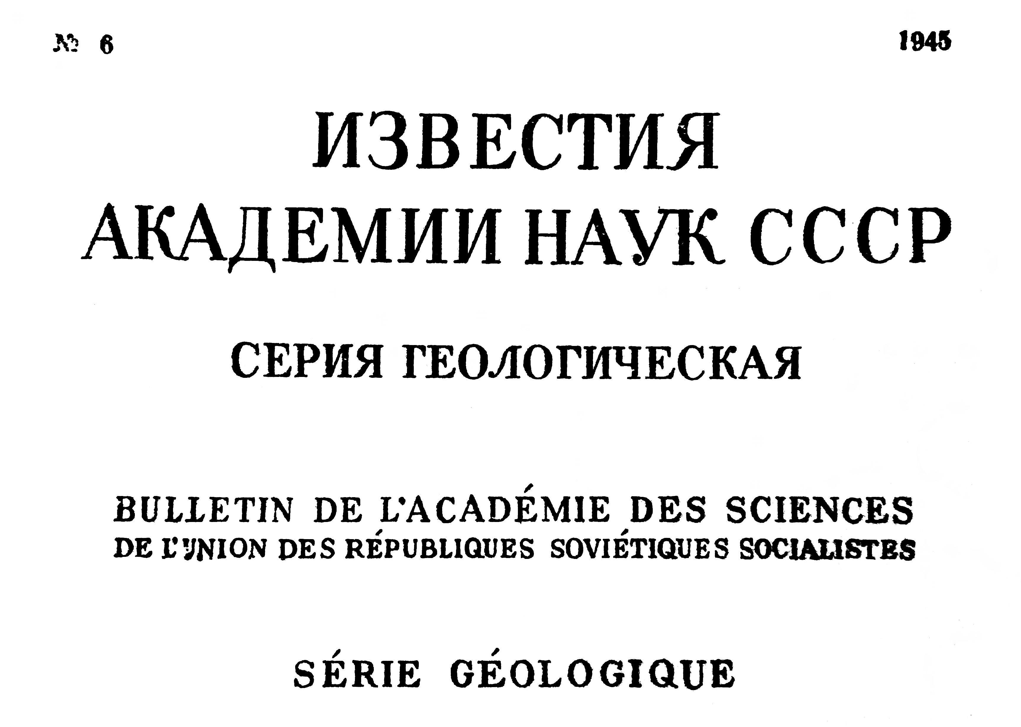 Известия Академии наук СССР. Серия геологическая